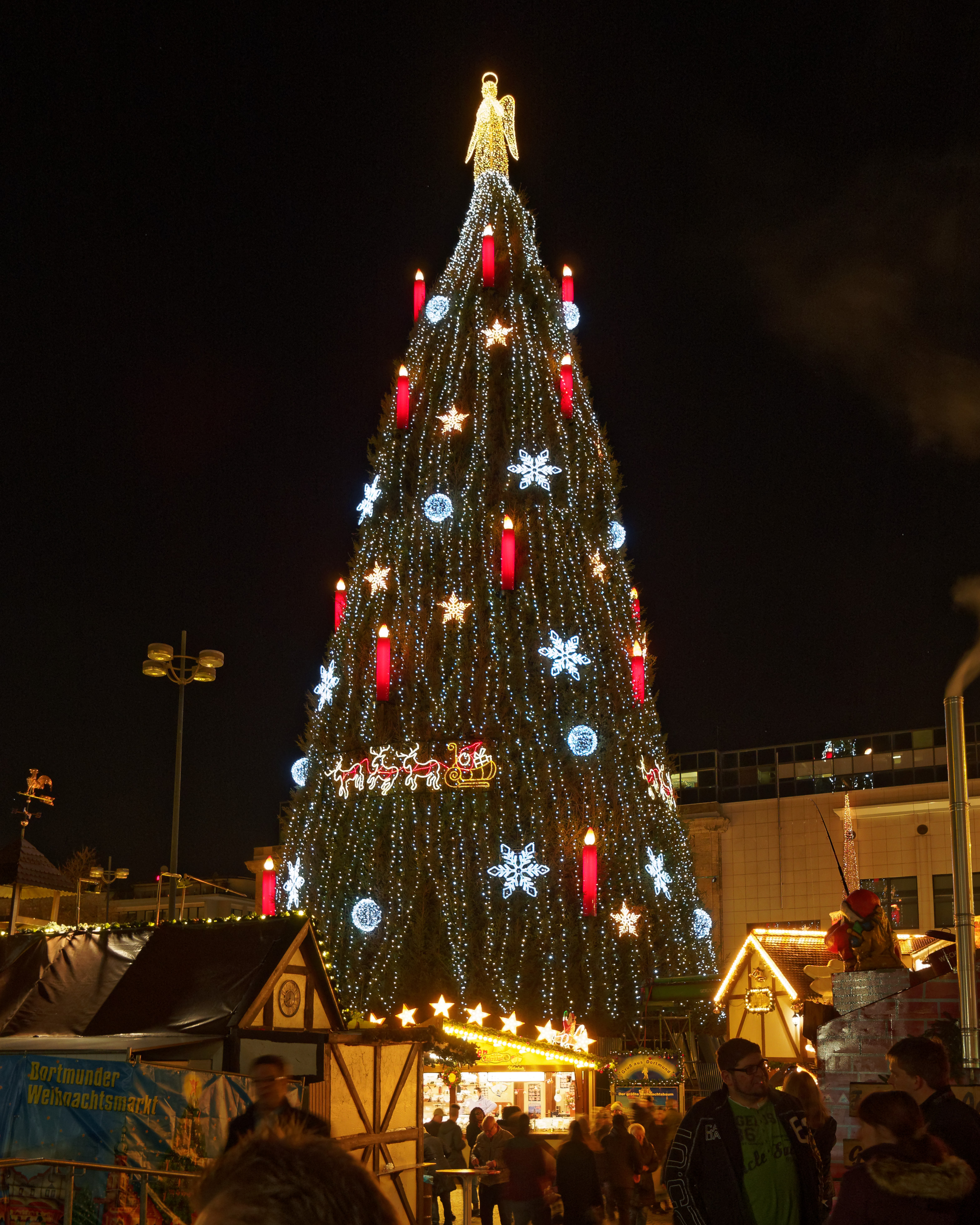 Der große Weihnachtsbaum im Dortmunder Weihnachtsmarkt auf dem Hansaplatz